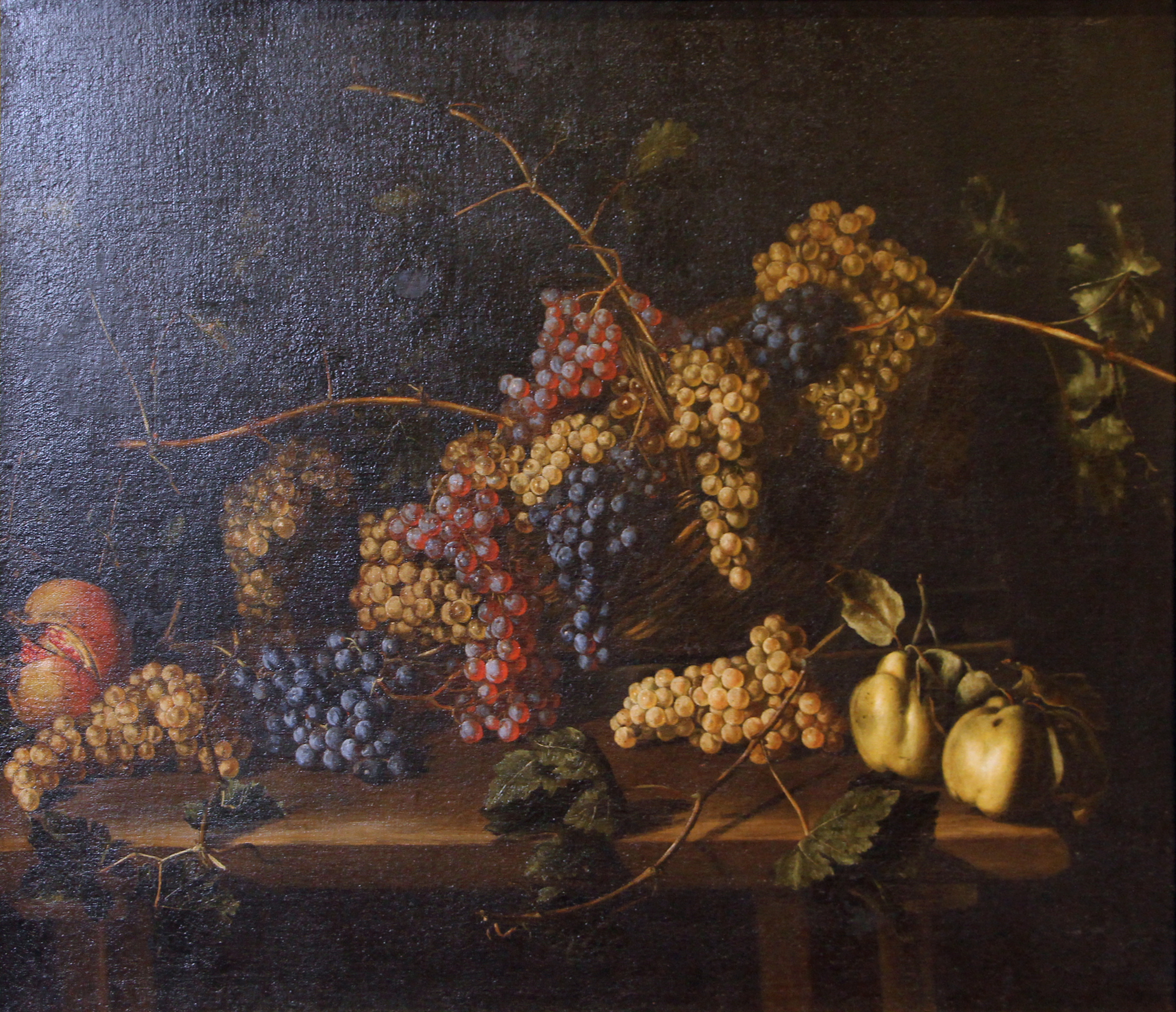 Villa medicea di Poggio a Caiano - MIBAC The making of this document was supported by Wikimedia CH. (Submit your project!) For all the files concerned, please see the category Supported by Wikimedia CH. This is a photo of a monument which is part of cultural heritage of Italy.